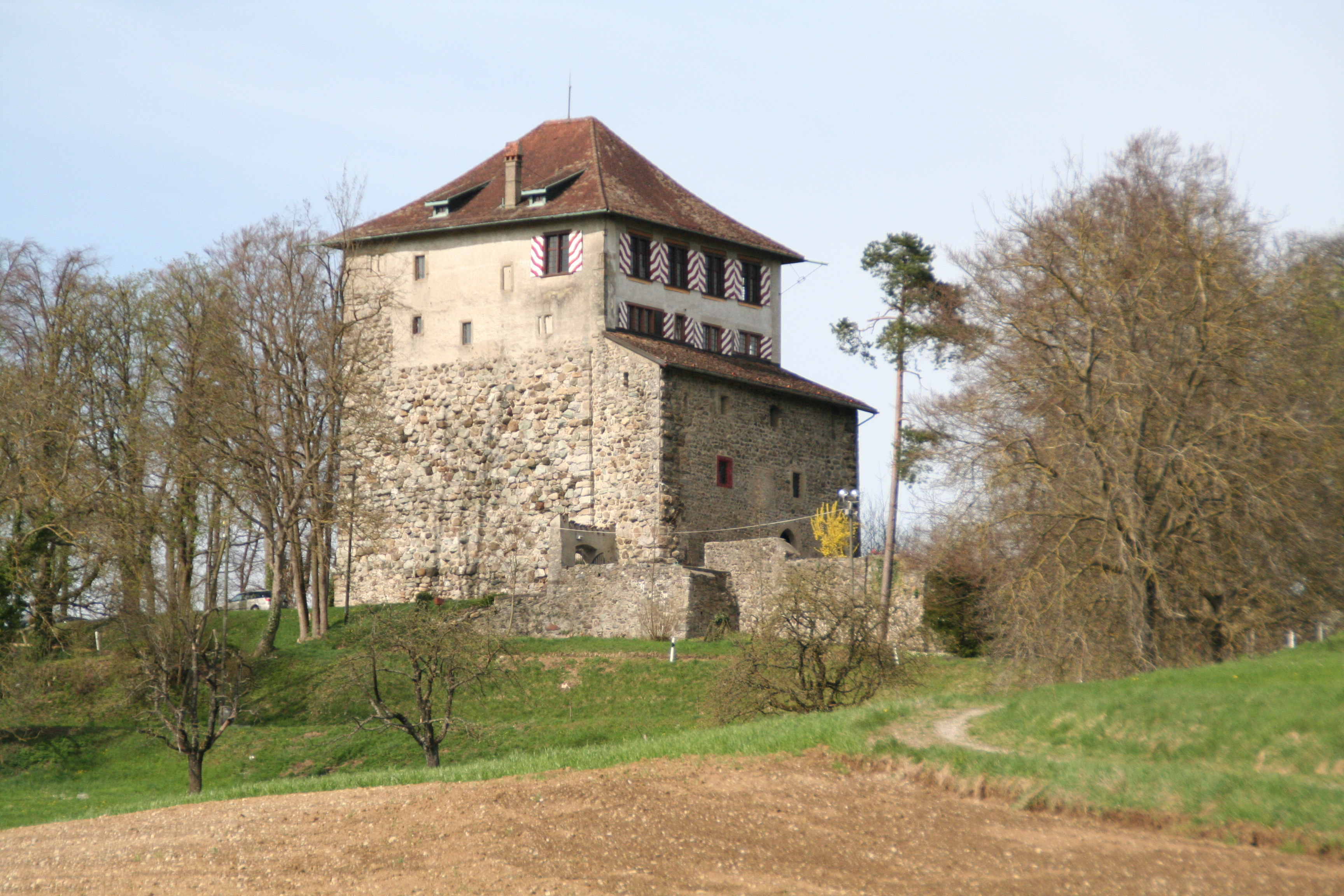 Schloss Mörsburg Ansicht von Süden